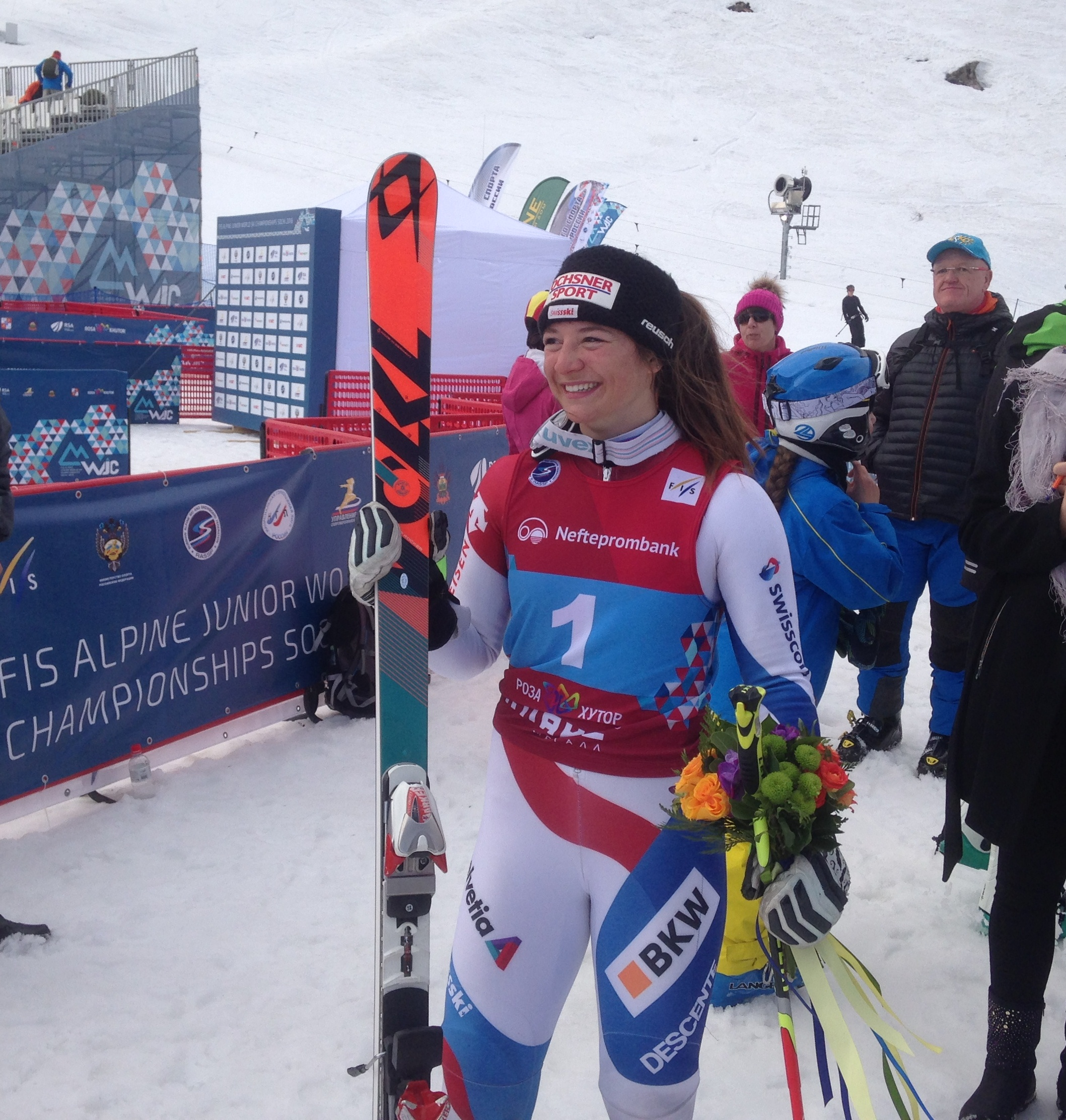 Чемпион мира в гигантском слаломе среди юниоров Жасмина Сутер, Швейцария. Юниорский Чемпионат мира по горнолыжному спорту Сочи 2016.